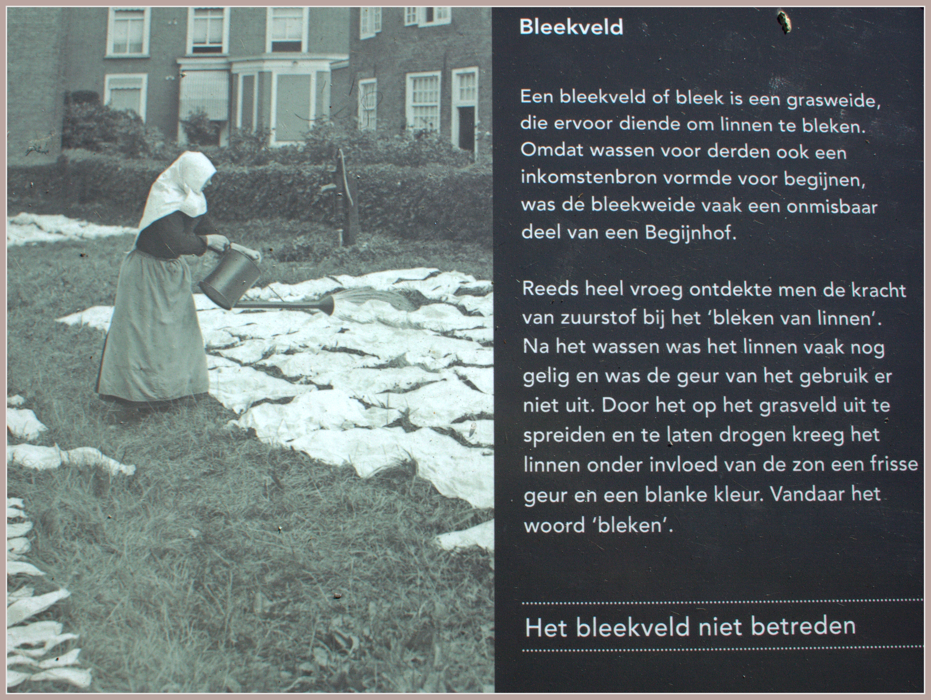 Bij het bleekveld in het Begijnhof in Breda krijgen we uitleg over het doen en laten van de Begijnen.